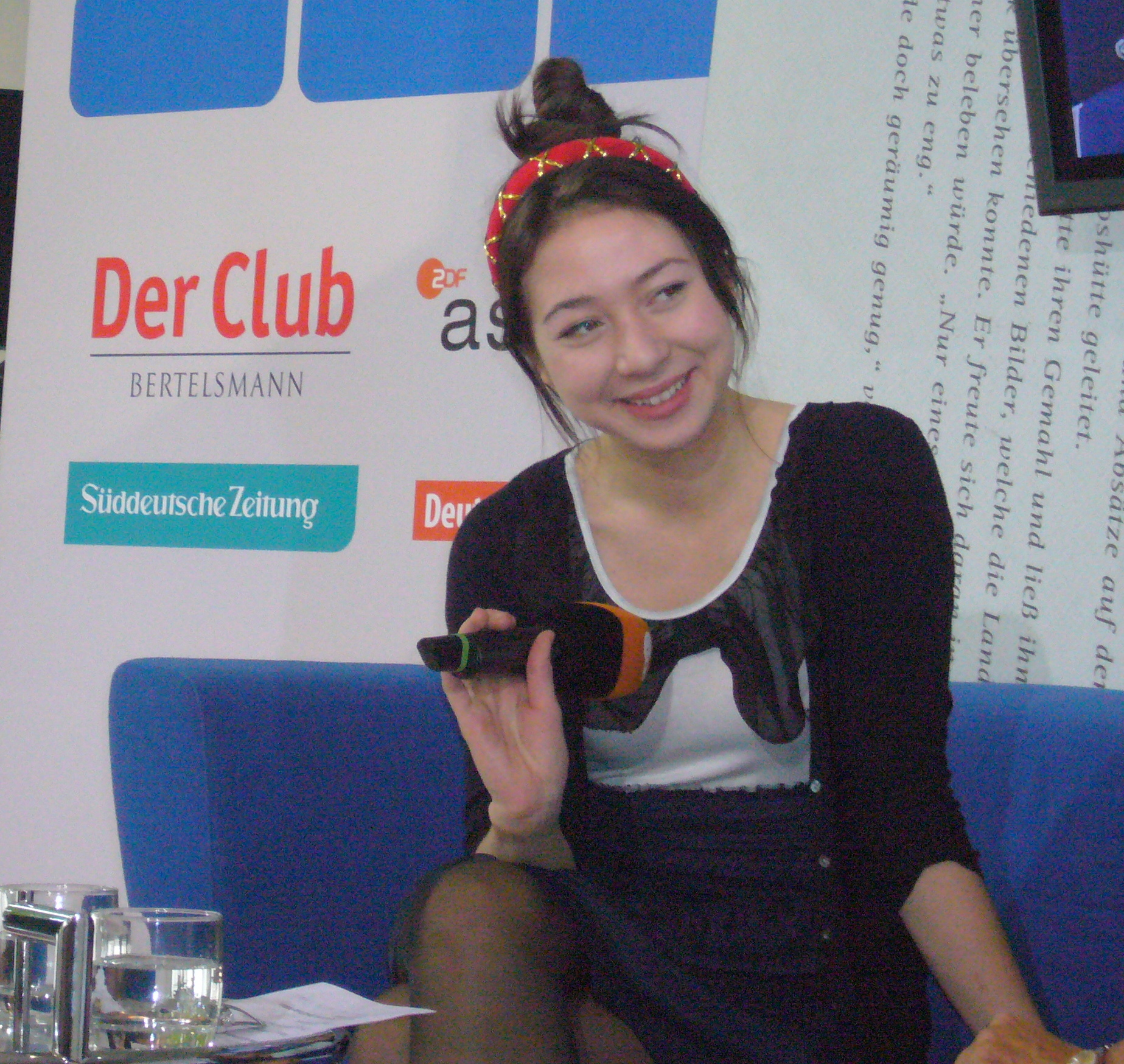 Dieses Fotos dürfen Sie honorarfrei nutzen, wenn Sie folgenden credit beachten: Copyright: Das blaue Sofa / Club Bertelsmann. Jenny-Mai Nuyen wurde 1988 als Tochter deutsch-vietnamesischer Eltern in München geboren. Geschichten schreibt sie, seit sie fünf ist, und mit dreizehn verfasste sie ihren ersten Roman. Als großer Fantasy-Fan hat Jenny-Mai Nuyen alles verschlungen, was es an literarischen Vorbildern gab: von Lloyd Alexander über Michael Ende bis zu Jonathan Stroud und Christopher Paolini. Seit ihrem literarischen DebütNijura – Das Erbe der Elfenkrone wird sie als eine der aufregendsten Entdeckungen der letzten Jahre gefeiert. Nach einem Filmstudium an der New York University lebt Jenny-Mai Nuyen heute in Berlin und widmet sich ganz dem Schreiben.